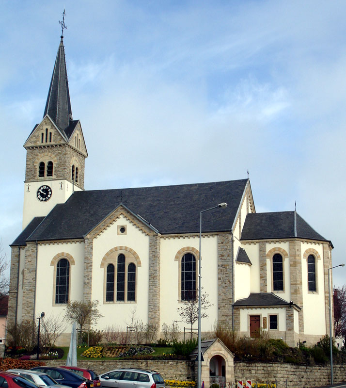 D'Parkierch vu Leideleng - Kierch Leideleng.